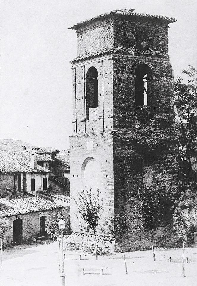 La torre Torre delle Ore, chiamata anche Torre dell'Orologio, prima di essere abbattuta nel 1888